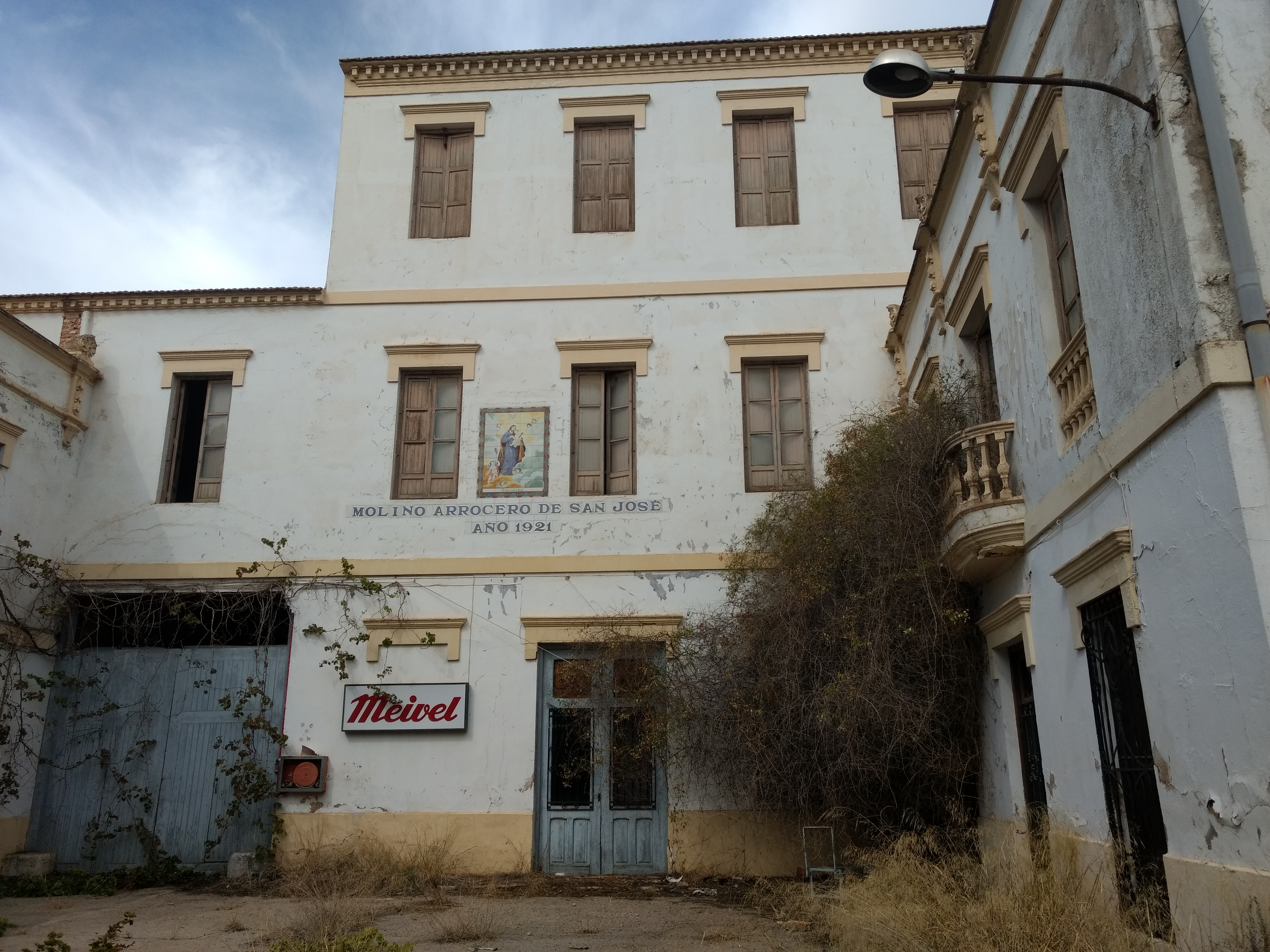 Molí arrosser. Fins 2007, fàbrica de Meivel.